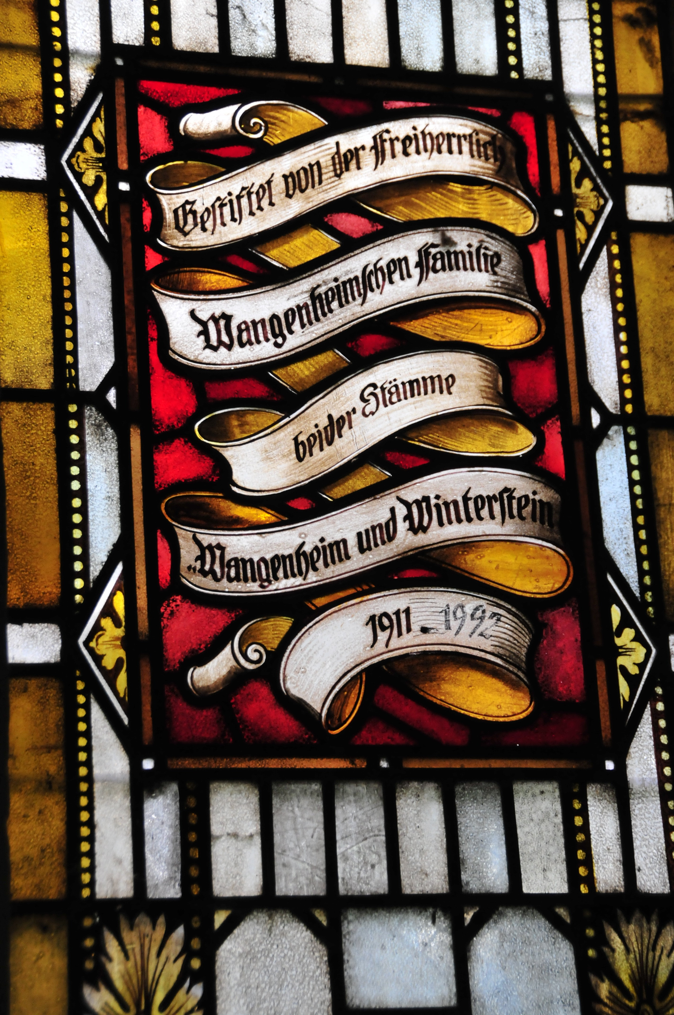 Wangenheim, Ausschnitt aus einem der östlichen Fenster (Stifternachweis)